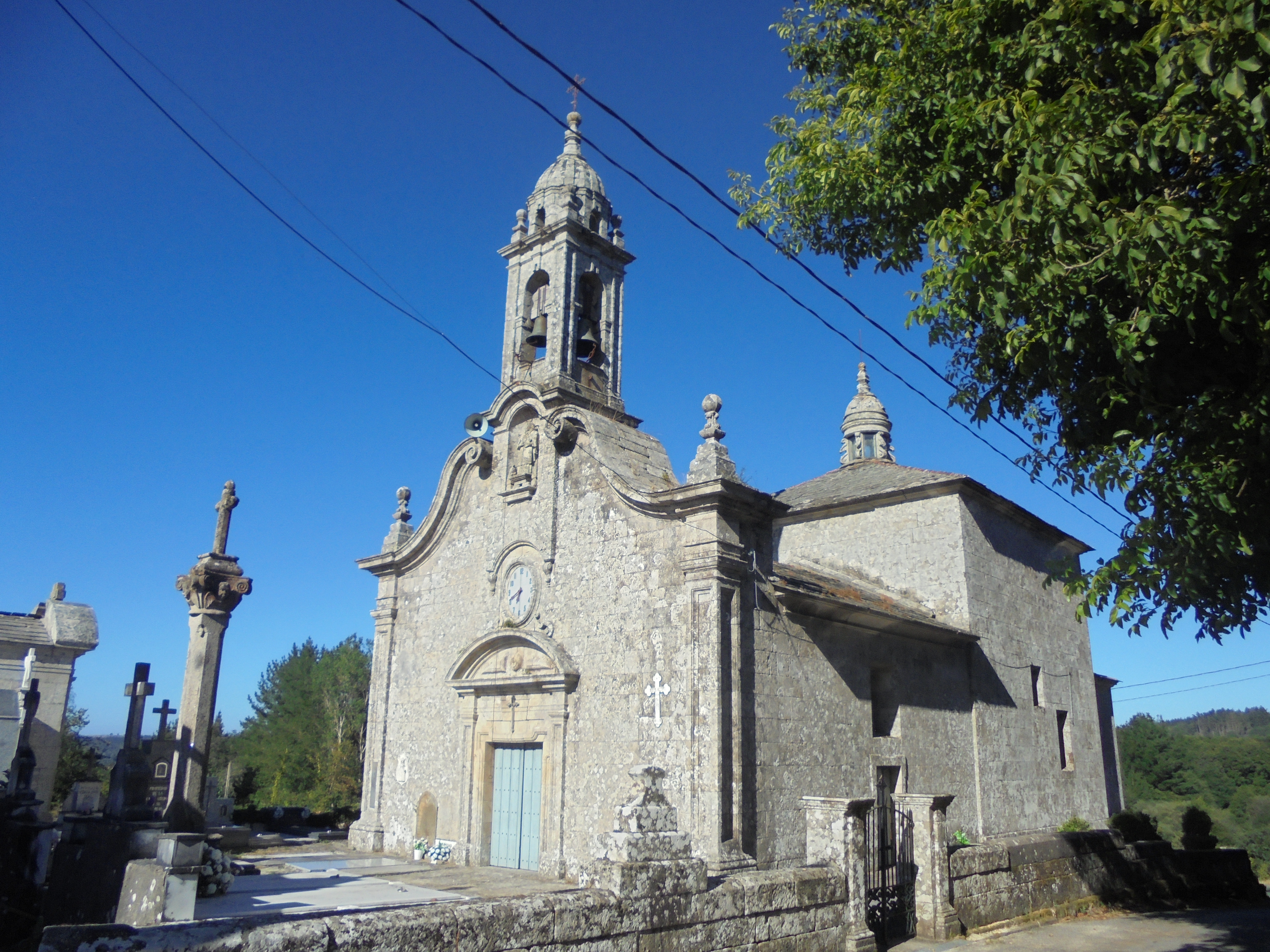 Igrexa parroquial de San Vicente do Burgo ( Lugo)